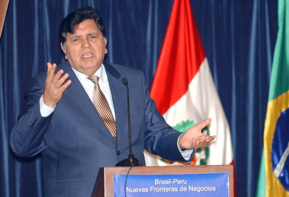 Lima (Peru) - Presidente Alan García participa en la apertura del Seminario Empresarial Brasil-Perú